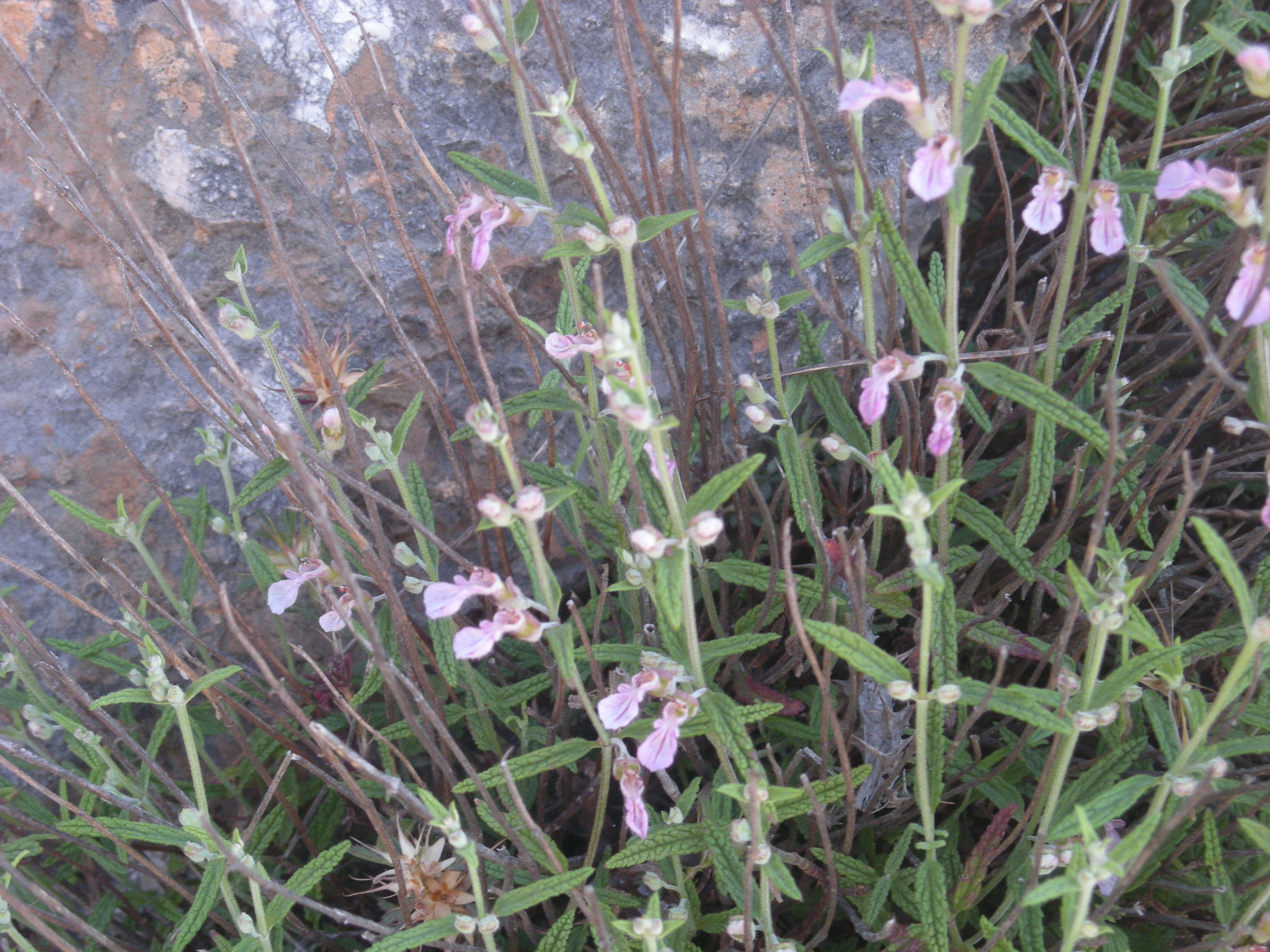 Brutònica (Teucrium asiaticum). Puig Major, Mallorca.